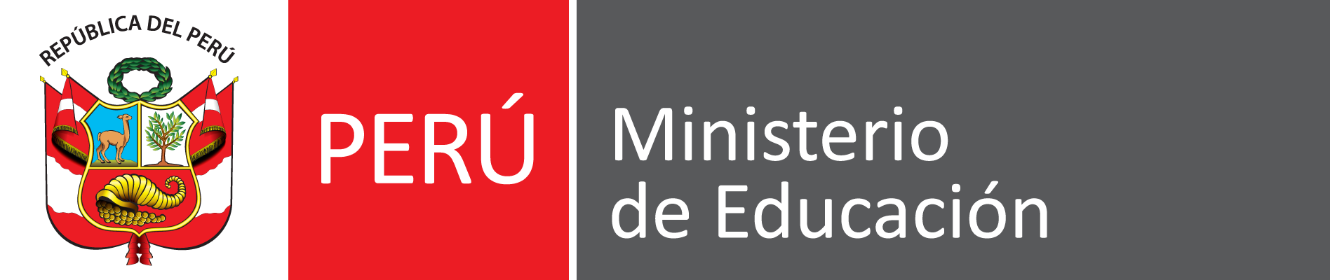 Colección Ministerios de la República del Perú